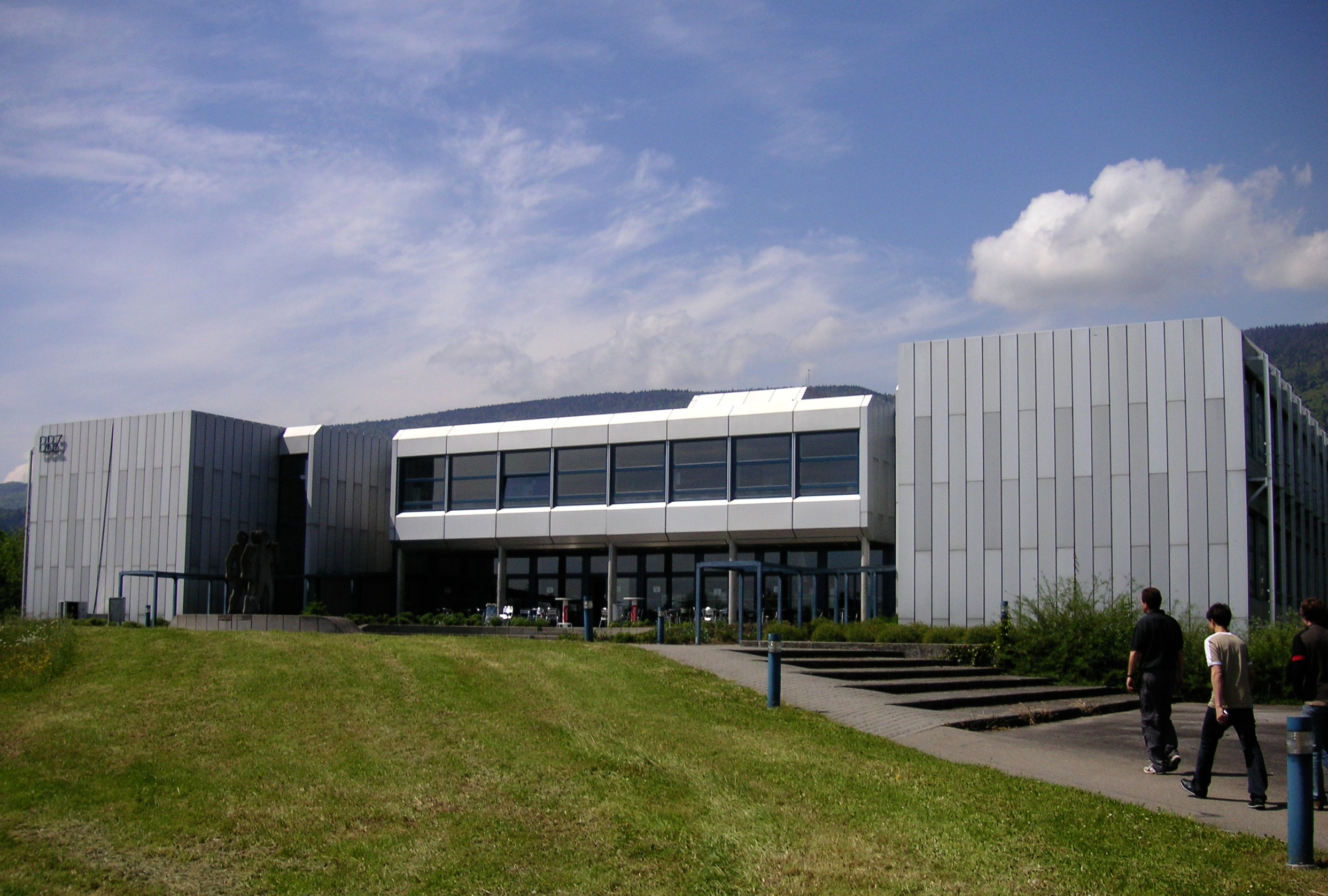 Berufsschulzentrum Grenchen mit höherer Fachschule für Technik und Uhrenmacherschule und KV